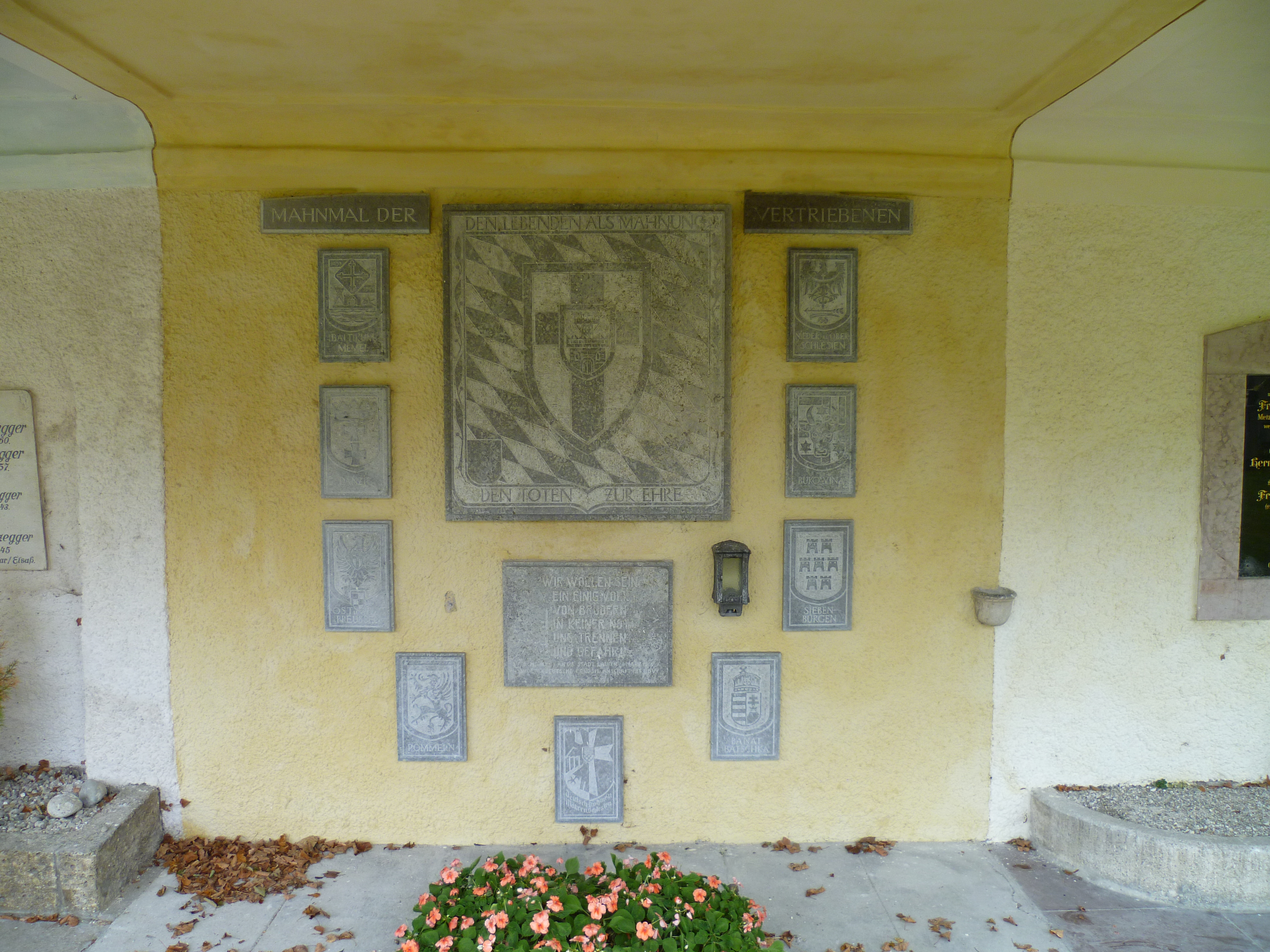 Vertriebenendenkmal unter den Arkaden des Klosterfriedhofs Laufen.